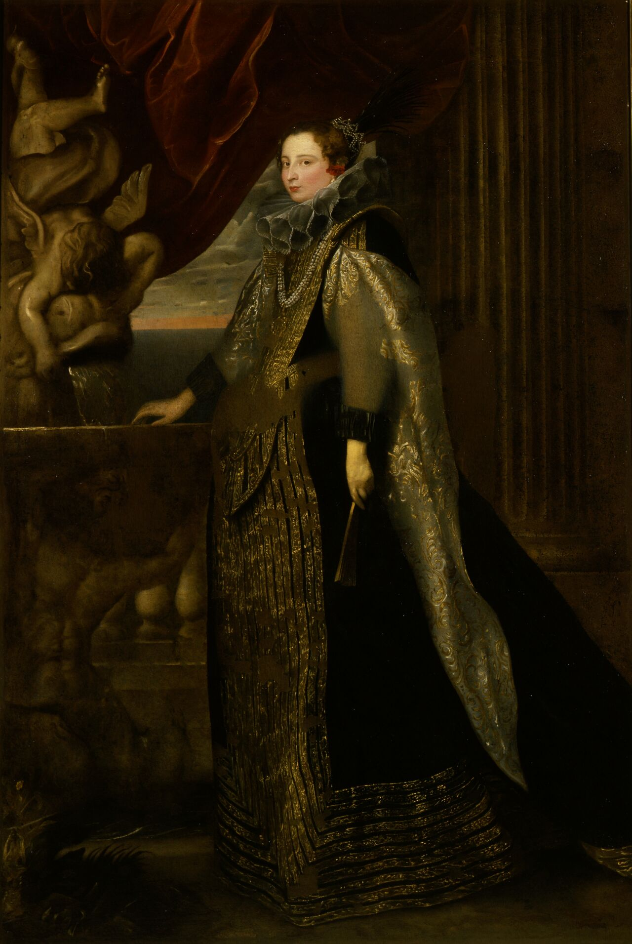 Ritratto di Caterina Balbi Durazzo before restoration